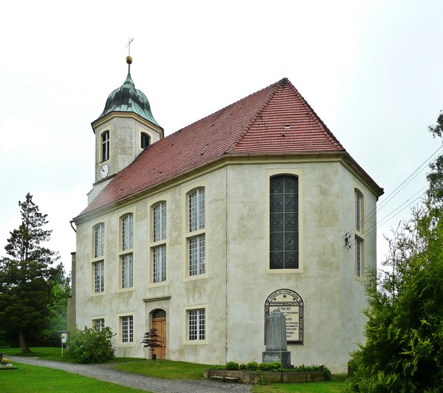 Schmiedefeld: Blick auf die St. Michaeliskirche